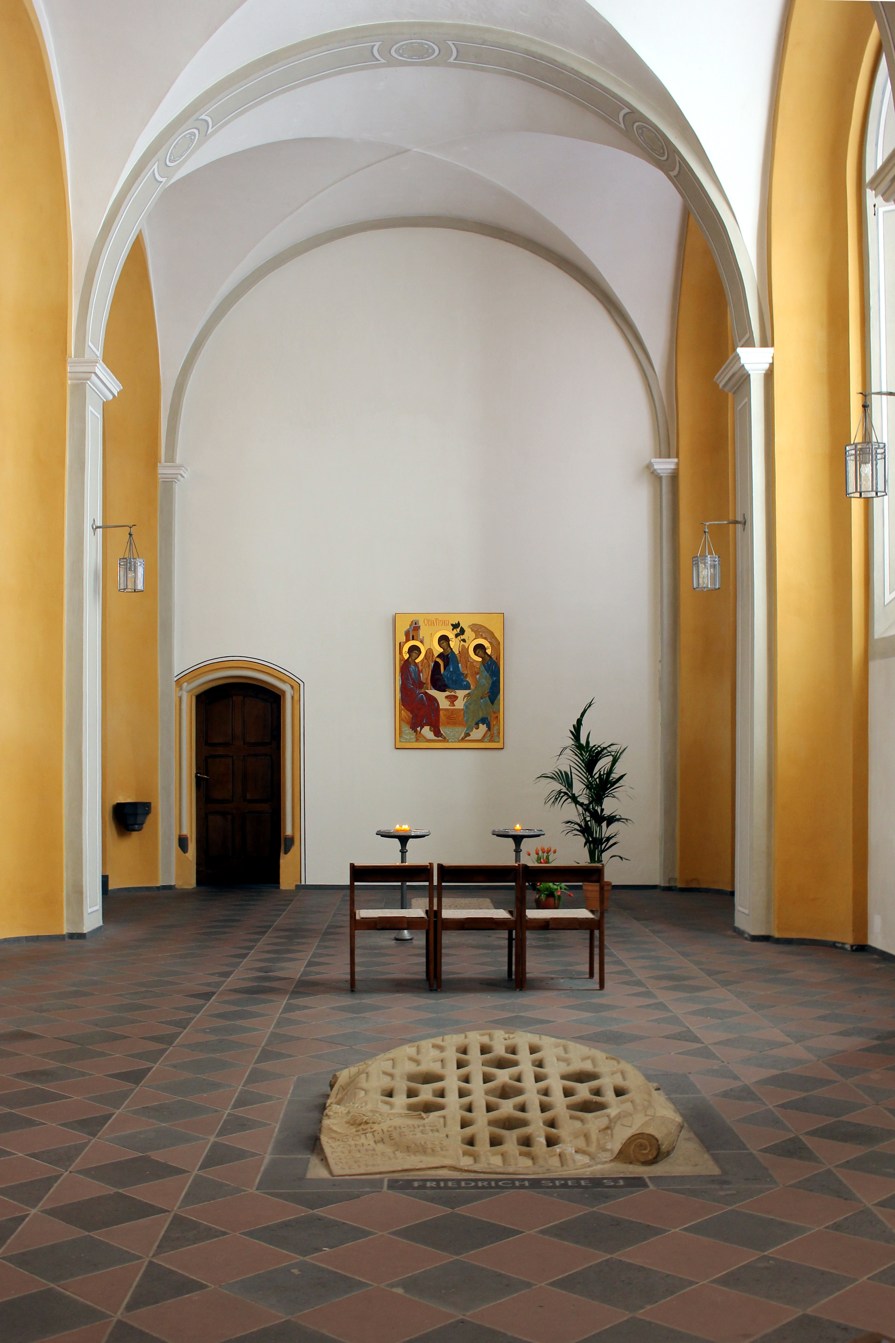 Südlicher Nebenchor der Jesuitenkirche Trier mit „Oculus“ bzw. Durchblick zur Spee-Gruft. Der im Boden eingelegte Oculus ist ein Werk des Bildhauers Jochem Pechau (1929–1989), in das links ein Vers aus Spees Gedicht-Zyklus „Trutz-Nachtigall“ eingearbeitet ist.